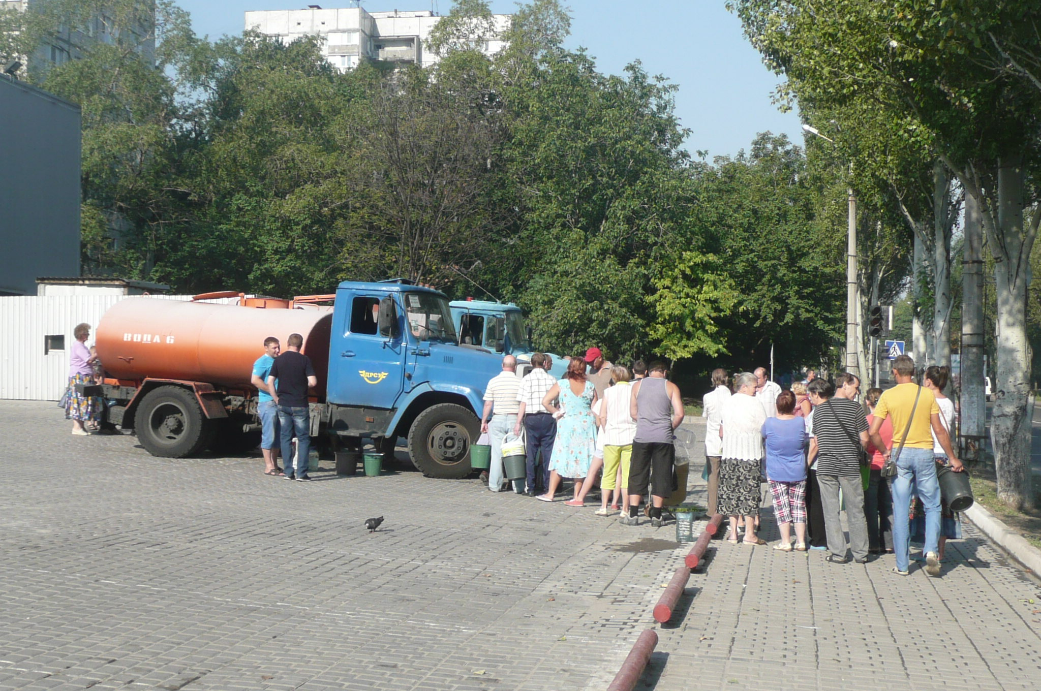 Донецк